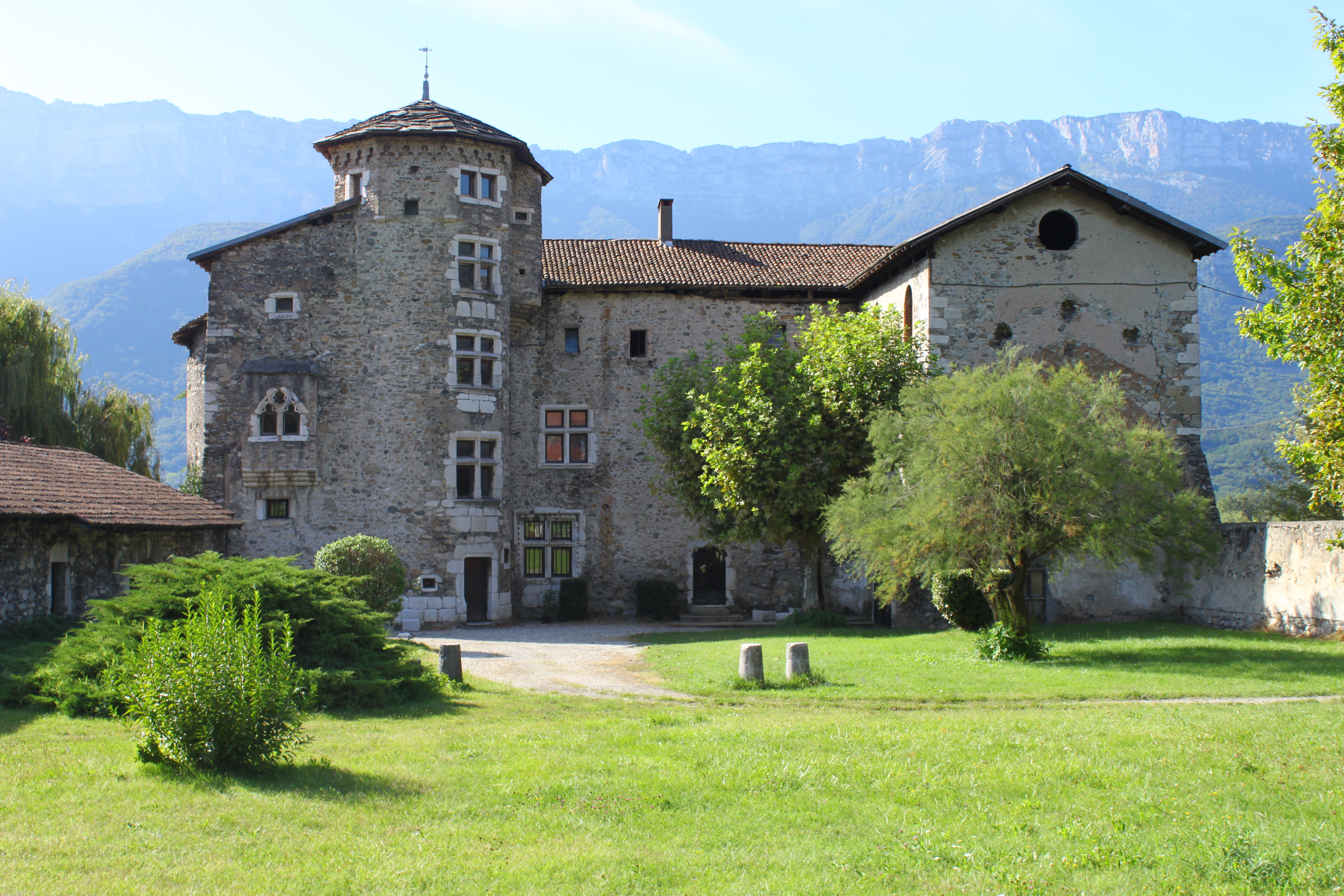 le Manoir de la tour au Cheylas (Isère).